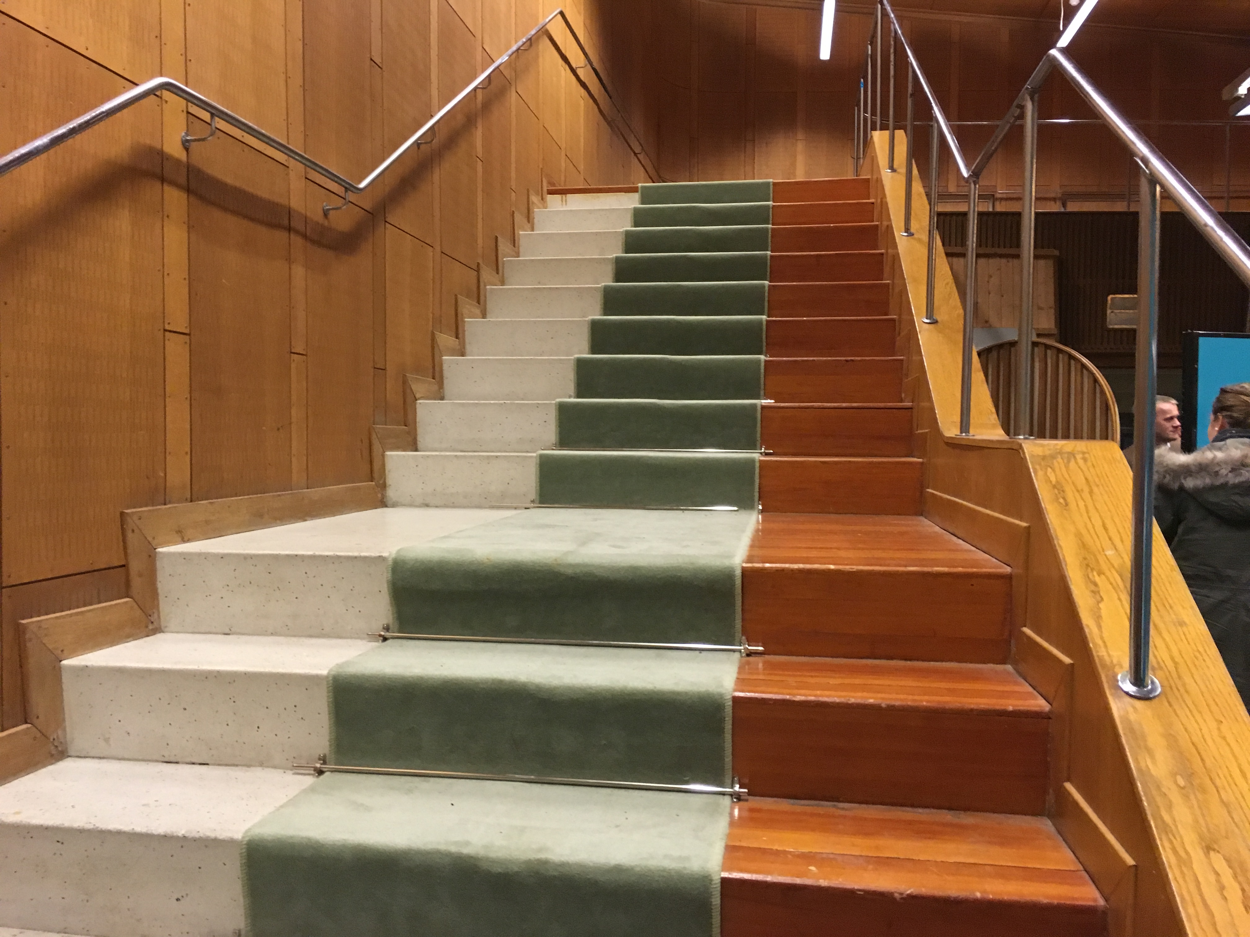 Trapp med tre ulike overflater i Radioteatrets studio på NRK Marienlyst.